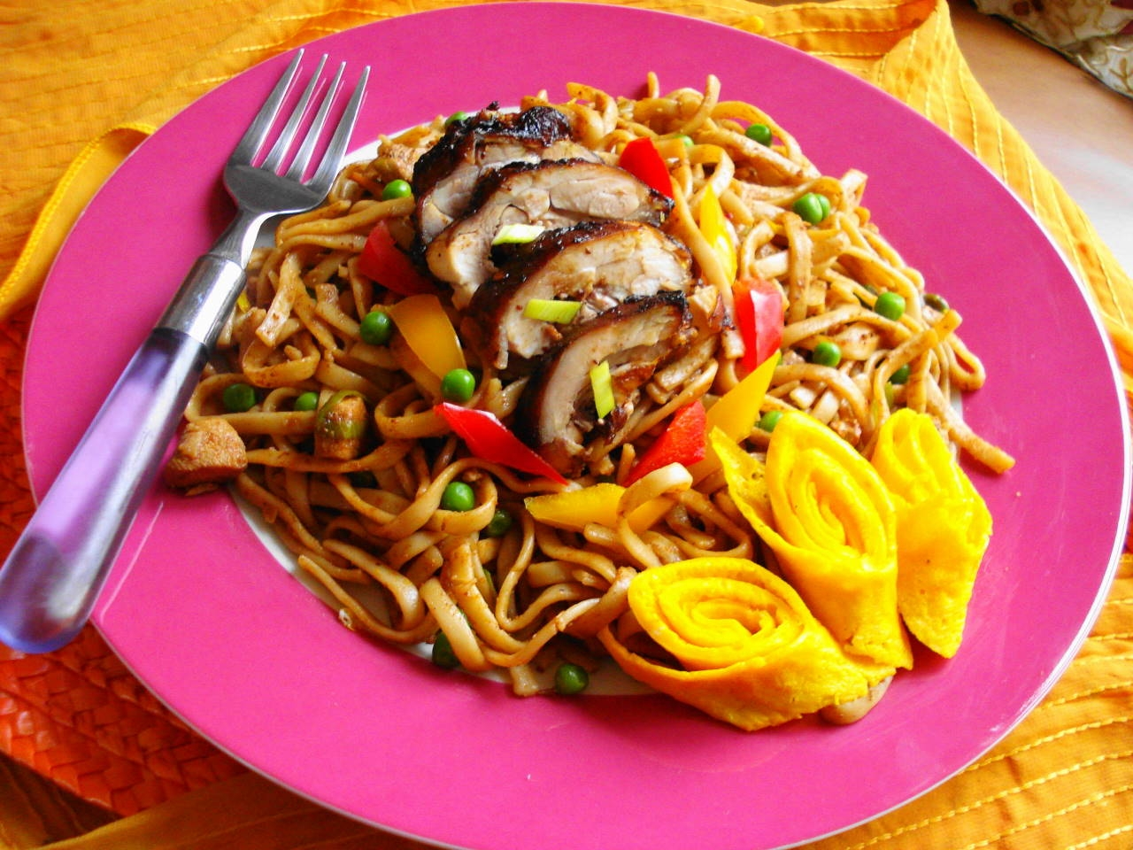 Bami Trafasie is met de komst van de Javanen uit Indonesië naar Suriname gebracht. De Surinaamse bami is donkerder van kleur en heeft een typisch Surinaamse smaak door het gebruik van specifieke Surinaamse verse kruiden.